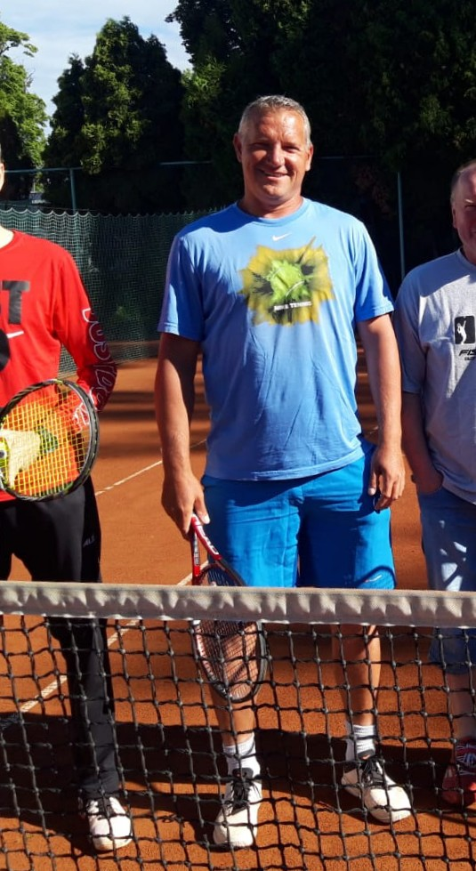 TK Strání r.2020